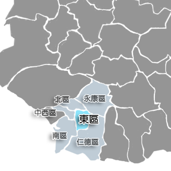 東區相對位置